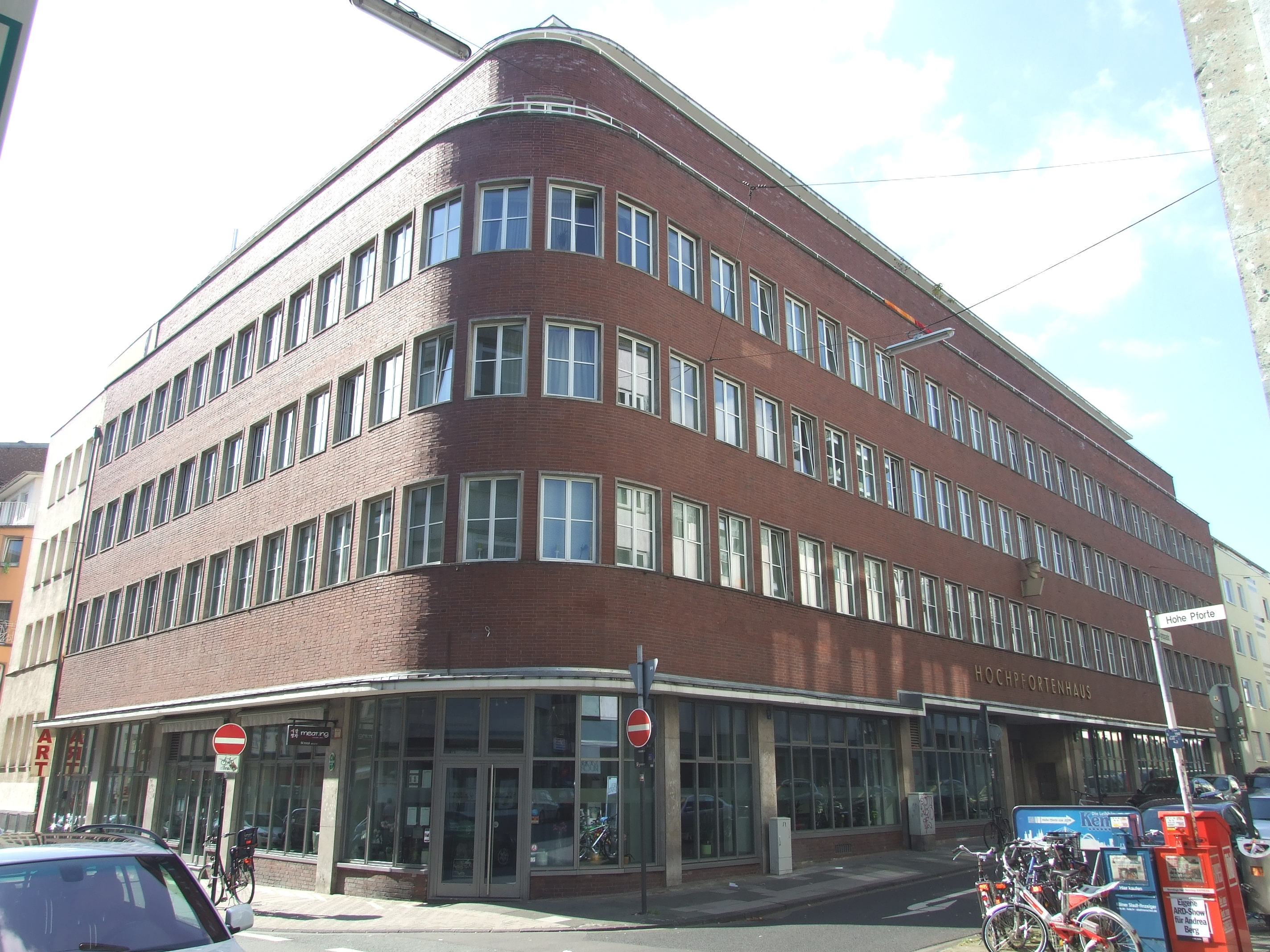 Geschäftshaus Hochpfortenhaus, Agrippastr. 1–5 This is a photograph of an architectural monument.